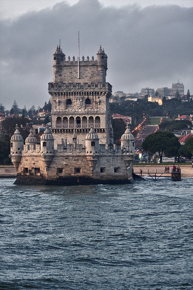 Torre de Belém This file was uploaded for Wiki Loves Monuments in Portugal with the unique identifier 323060.